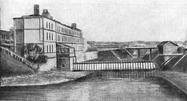 Краснохолмская плотина на Водоотводном канале в 1908 году. Вид в направлении Москвы-реки. Слева на фото - городская прачечная, справа - лесопилка.